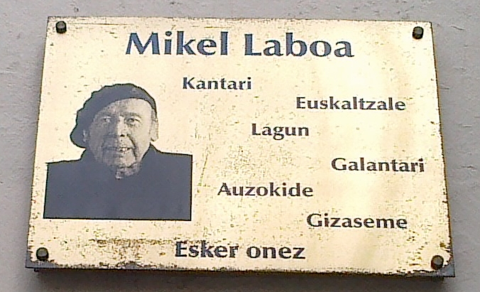 Mikel Laboaren omenezko plaka, Antigua (Donostia)